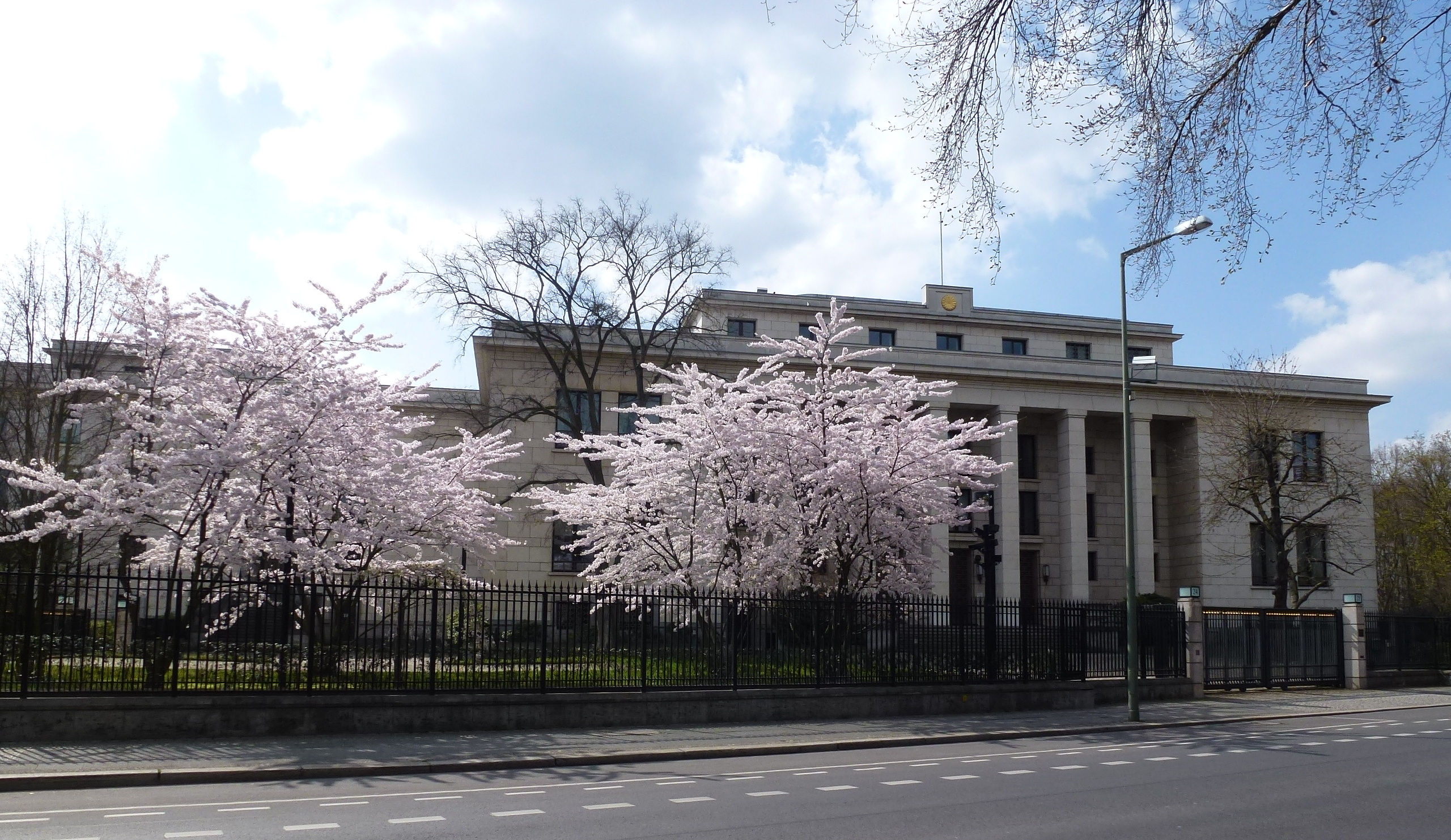 Berlin-Tiergarten Tiergartenstraße Japanische Botschaft